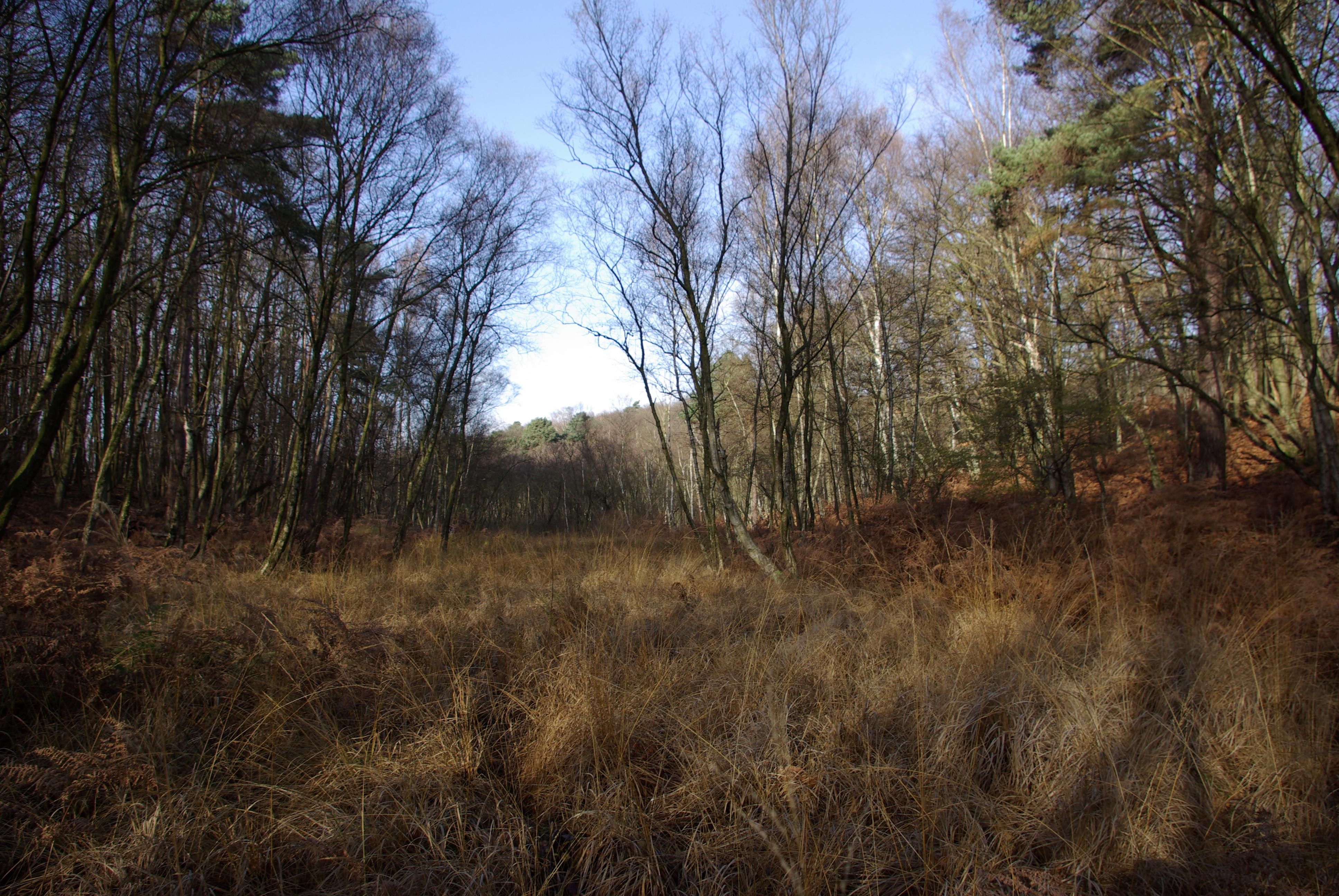 tourbière de la cailleuse, à proximité de la route des fonds, forêt de Montmorency, Val-d'Oise.